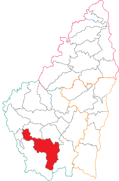 Situation du canton dans le département de l'Ardèche (France)